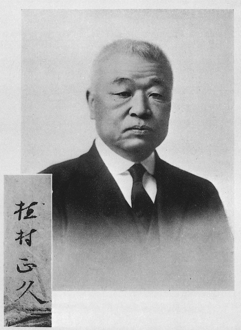 Portrait of Uemura Masahisa (植村正久, 1858 – 1925)